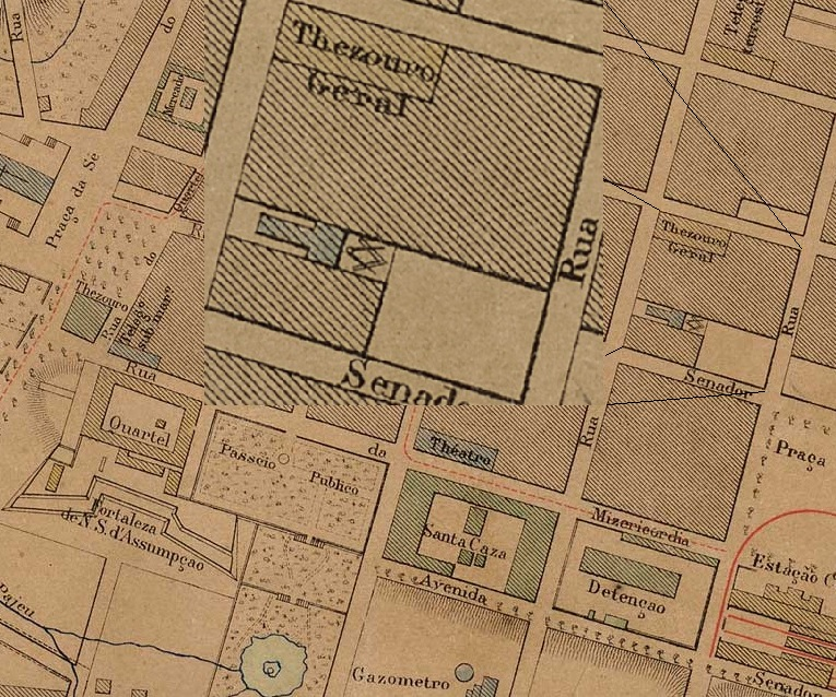 Parte da "Planta da cidade da Fortaleza capital da provincia do Ceará" de autoria de Adolpho Herbster publicada em 1888.